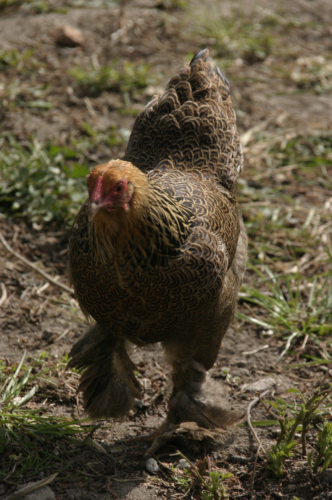 Zwerg-Brahma Henne rebhuhnfarben gebändert